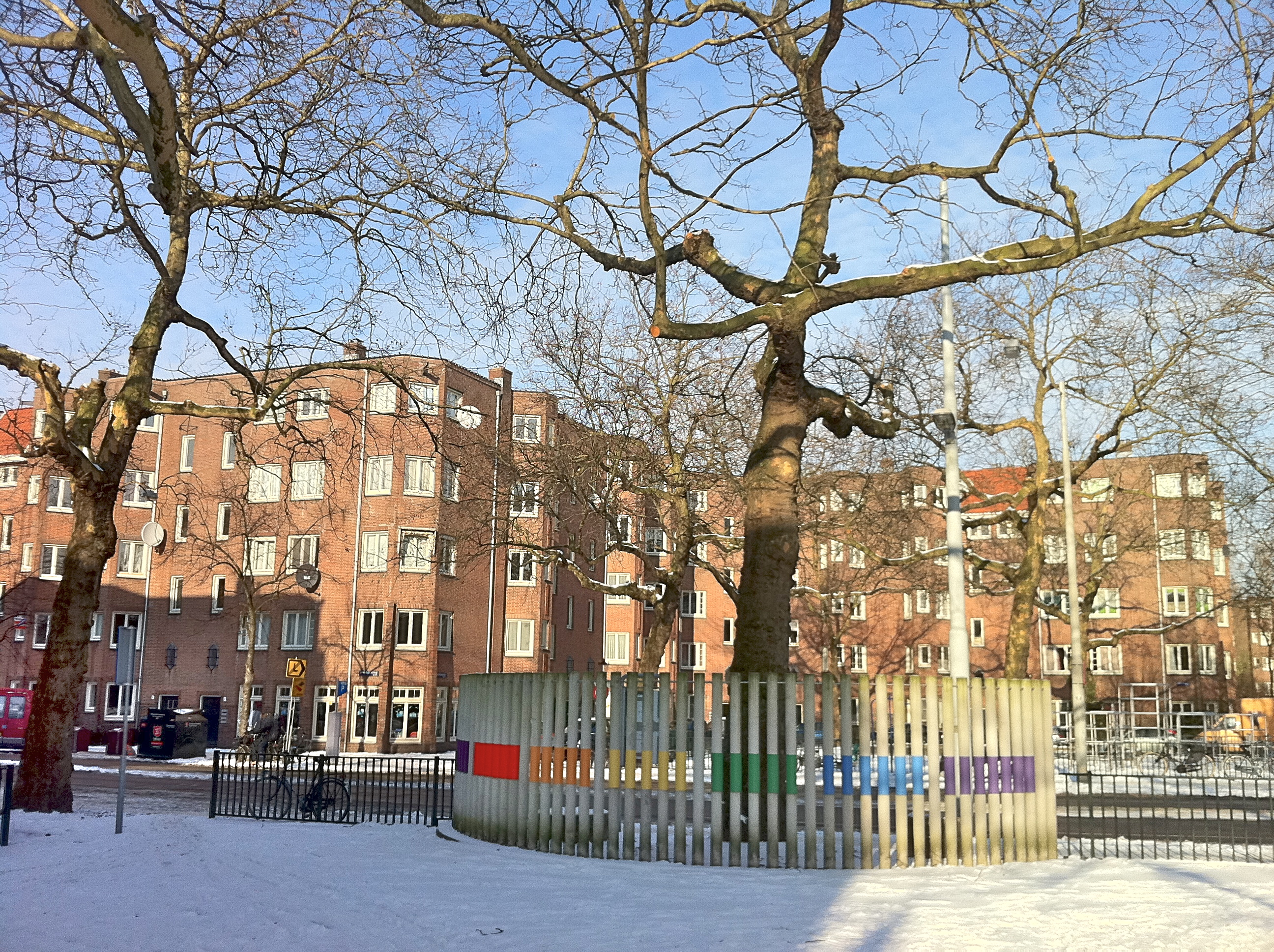 Amsterdam-Zuid: Bertelmanplein. Bouwblok van 184 etagewoningen, Bouwvereeniging Rochdale, blok a fase 1, doorlopend naar Cornelis Krusemanstraat 57 Amsterdam; op de voorgrond The rainbow is my favourite colour